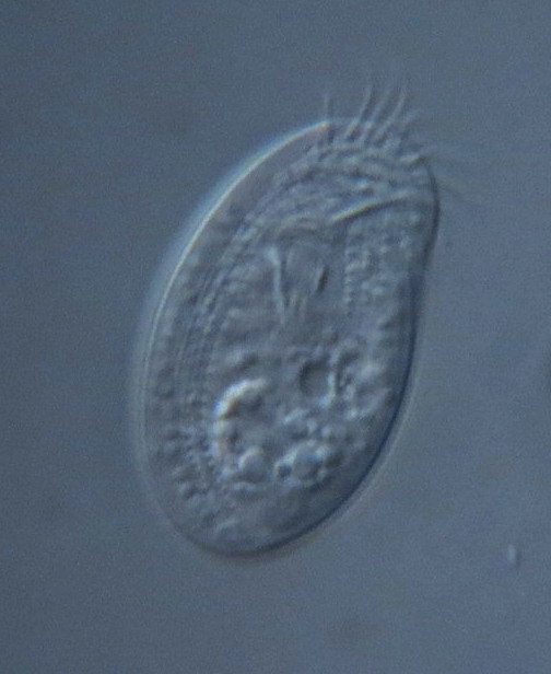 Chilodonella uncinata - 400x